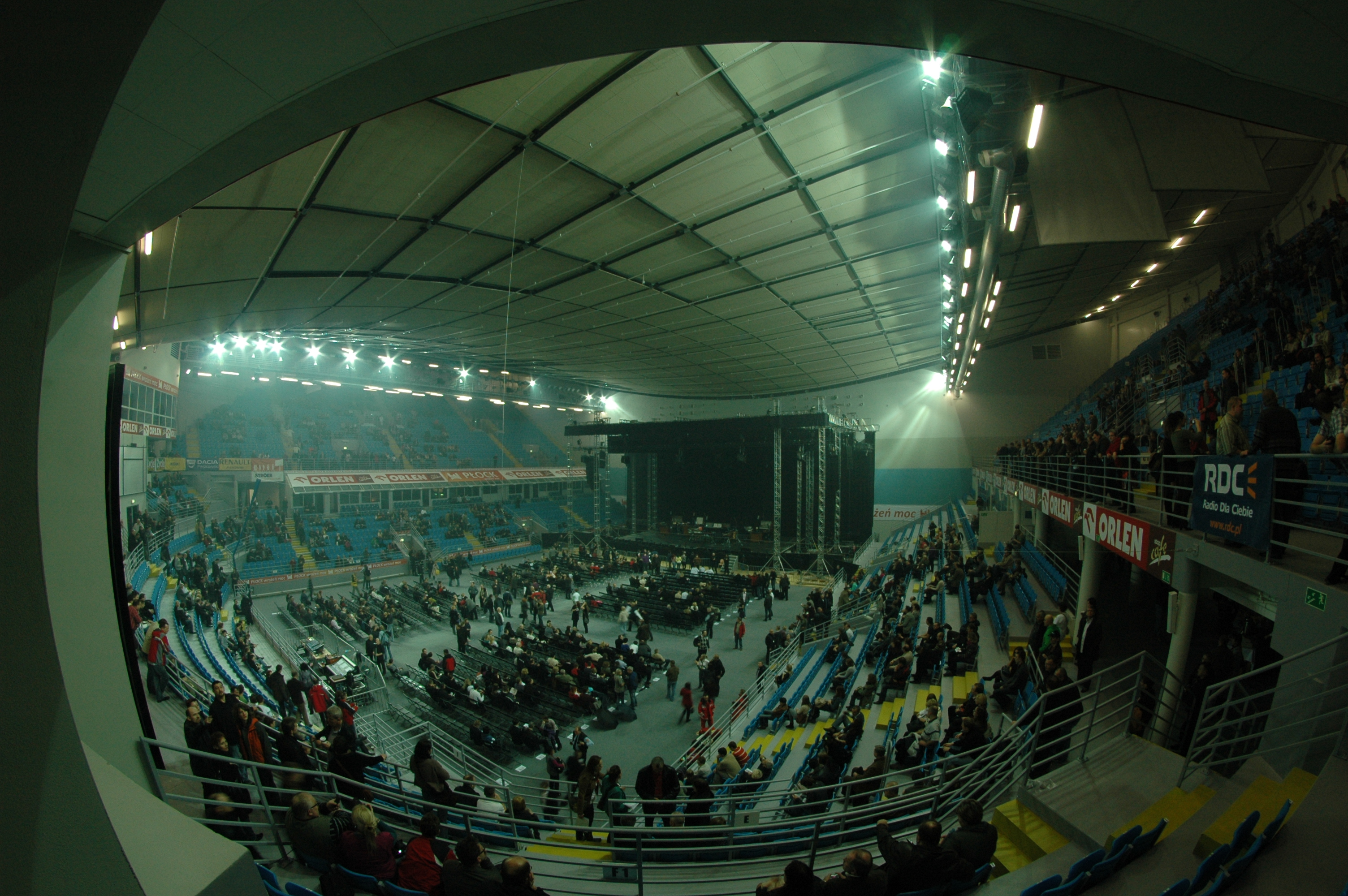 Orlen Arena w Płocku podczas koncertu Jean-Michel Jarre otwierającej ten obiekt w dniu 13.11.2010.